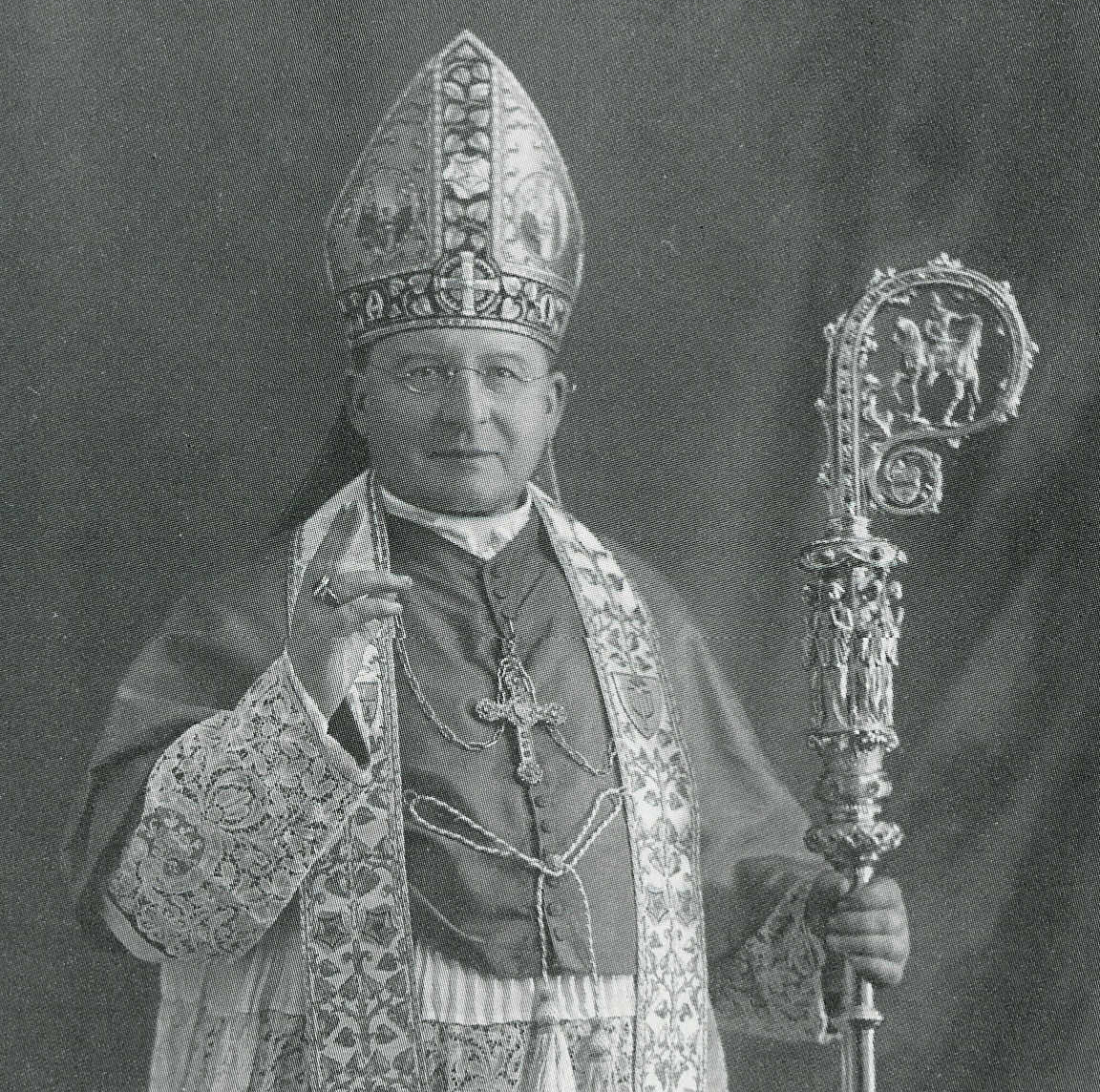 Honoré Coppieters (1874-1947) - Bisschop van Gent (1927-1947) - Gent - Oost-Vlaanderen - België